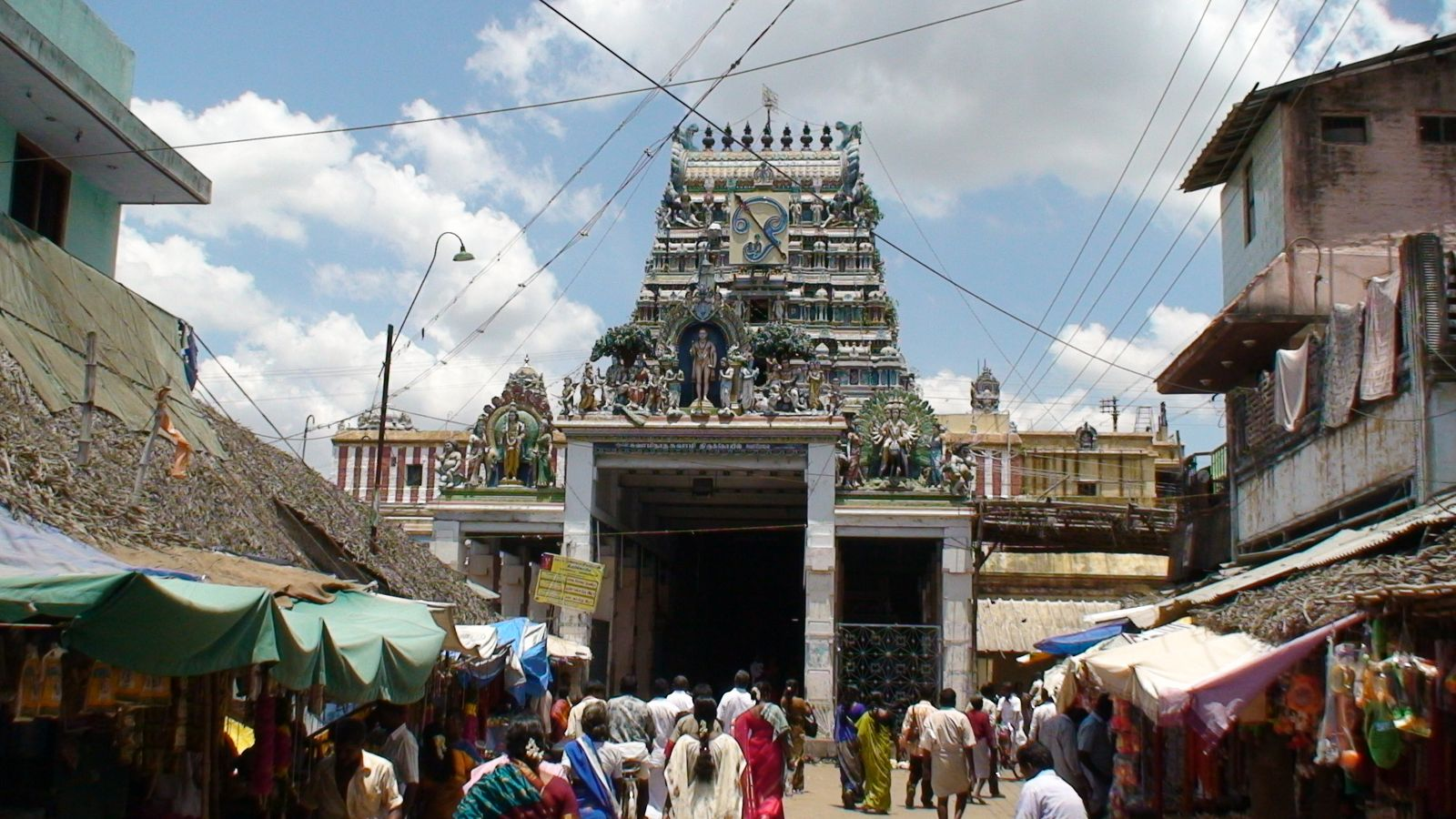 Arulmigu Swaminatha Swami Temple, Swamimalai